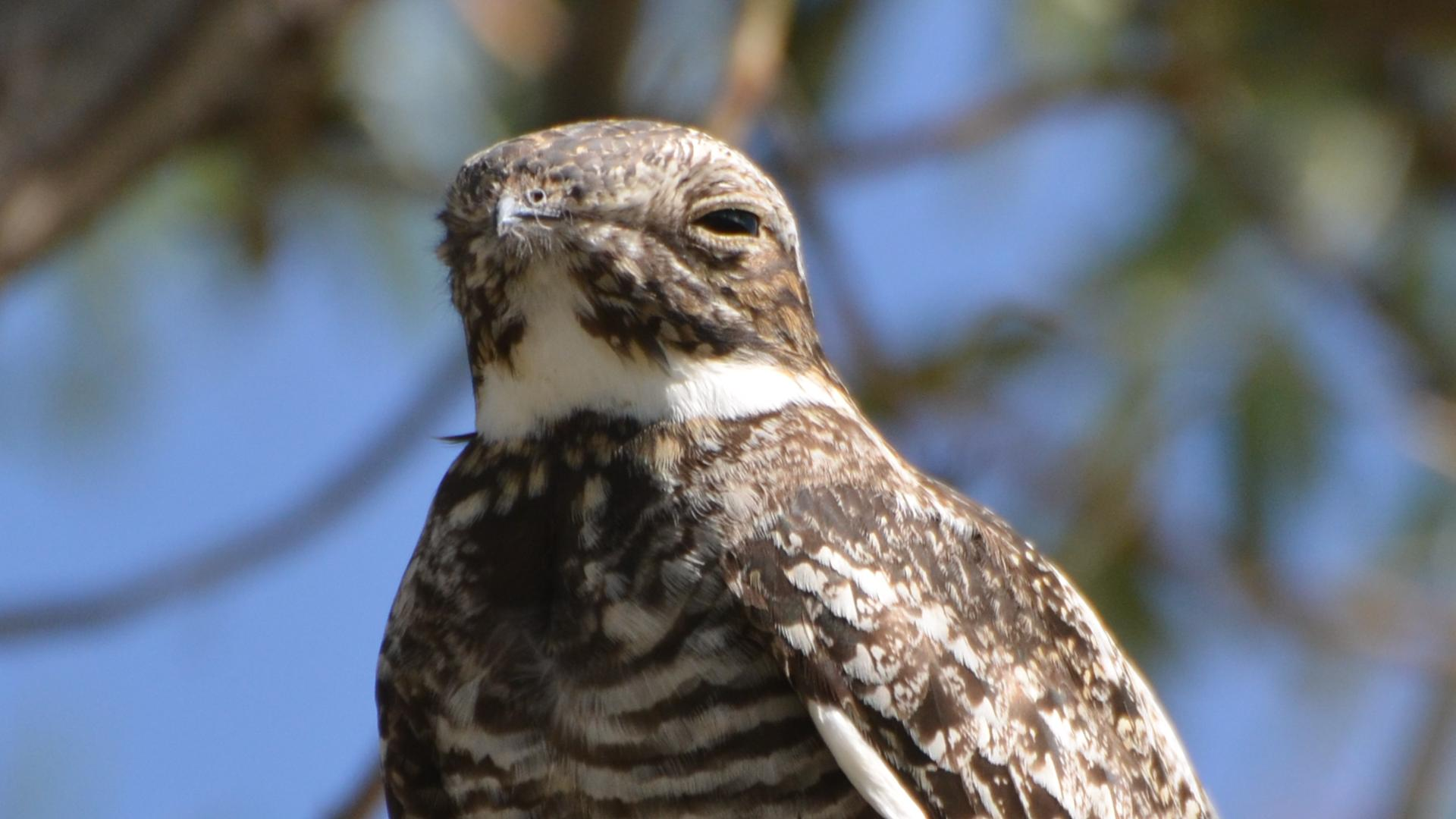 Oregon 2014